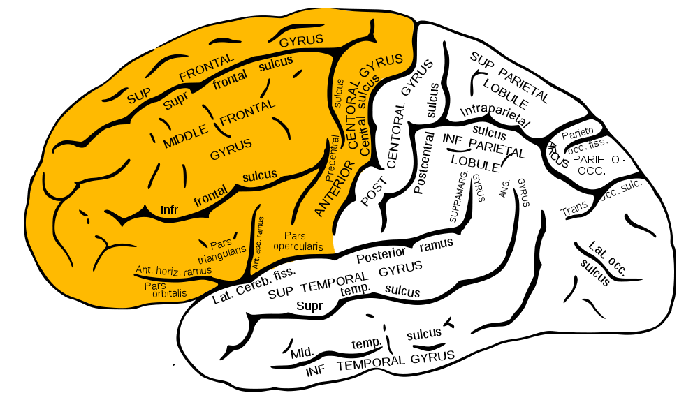 Frontal lobe.